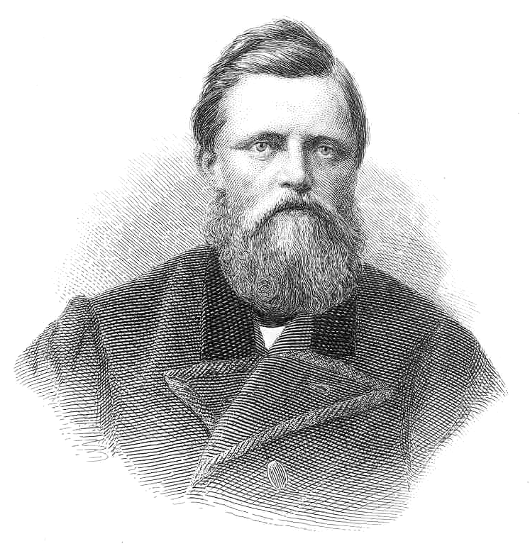 Friedrich Hegemann (1836-1913), Kapitän der Hansa bei der 2. Deutschen Nordpolarexpedition 1869/70.